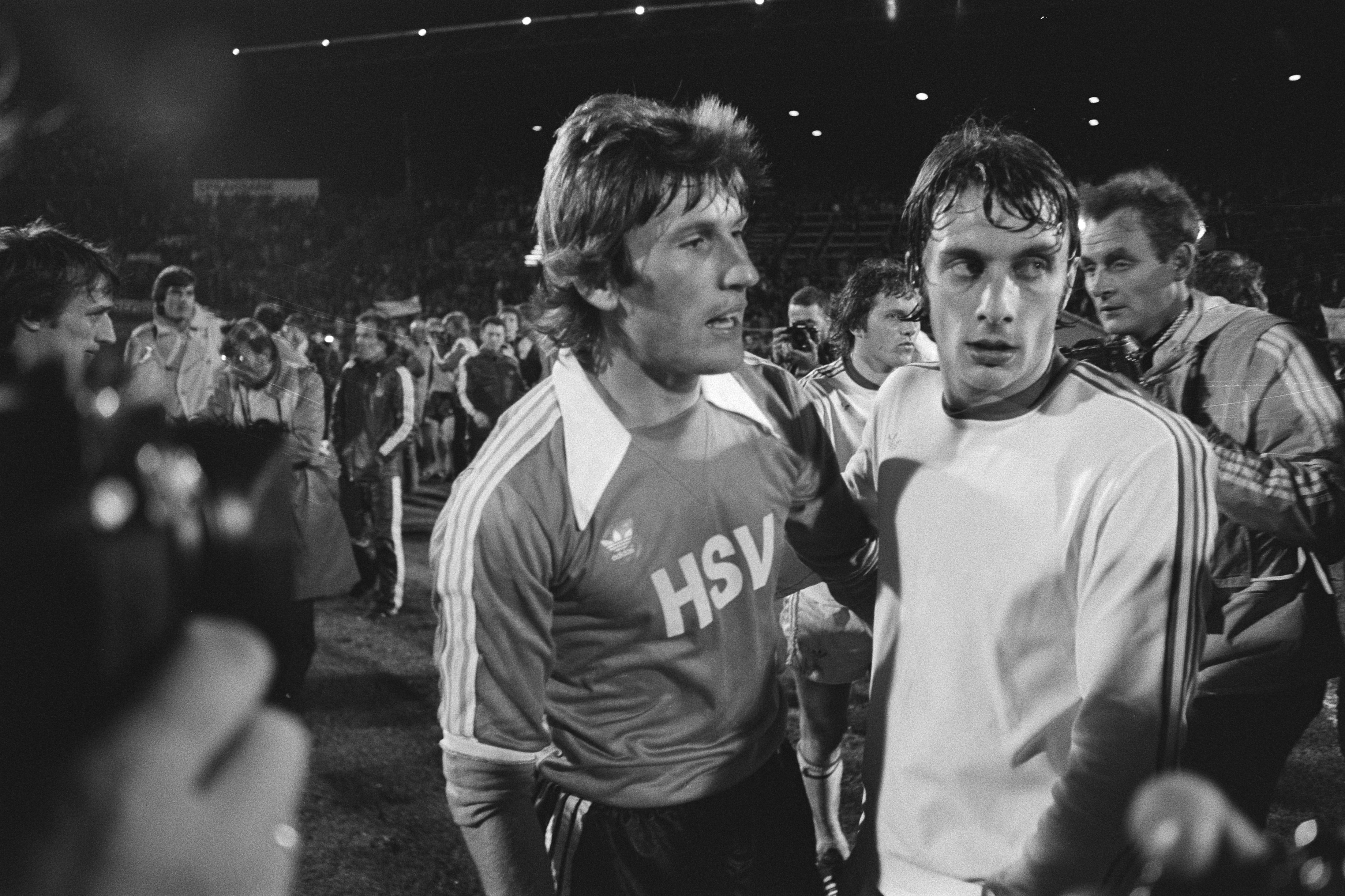 Collectie / Archief : Fotocollectie Anefo Reportage / Serie : [ onbekend ] Beschrijving : Anderlecht tegen HSV (finale Europa Cup II ); Manfred Kaltz en Gilbert van Binst (Anderlecht) na afloop van de wedstrijd Datum : 11 mei 1977 Locatie : Amsterdam Trefwoorden : voetbal, voetballers Persoonsnaam : Binst, Gilbert van, Kaltz, Manfred Fotograaf : Peters, Hans / Anefo Auteursrechthebbende : Nationaal Archief Materiaalsoort : Negatief (zwart/wit) Nummer archiefinventaris : bekijk toegang 2.24.01.05 Bestanddeelnummer : 929-1738